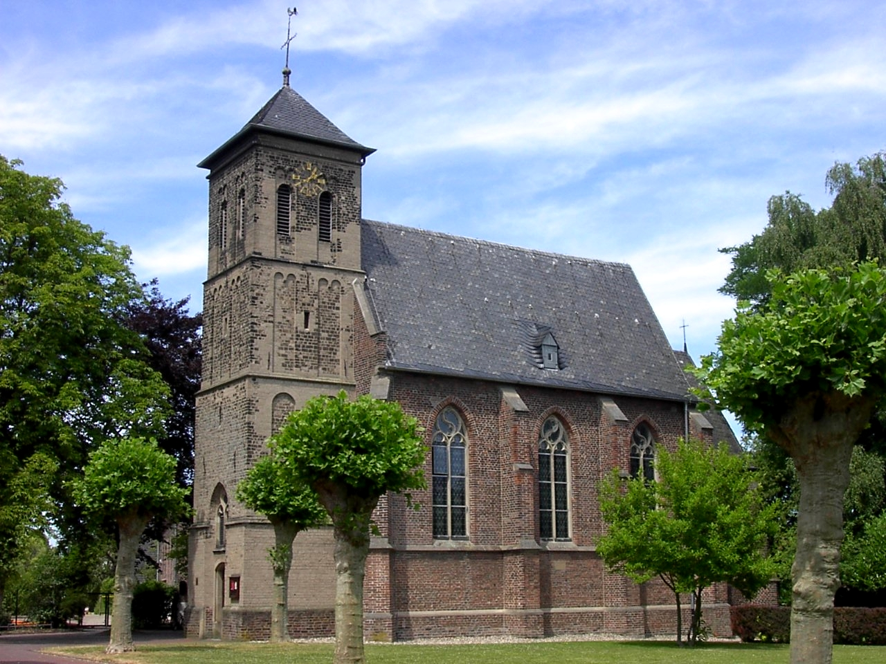 Kirche St. Pantaleon in Lüttingen selbst fotografiert von Benutzer:Xantener am 29. Dez 2004 Lizenz: GFDL